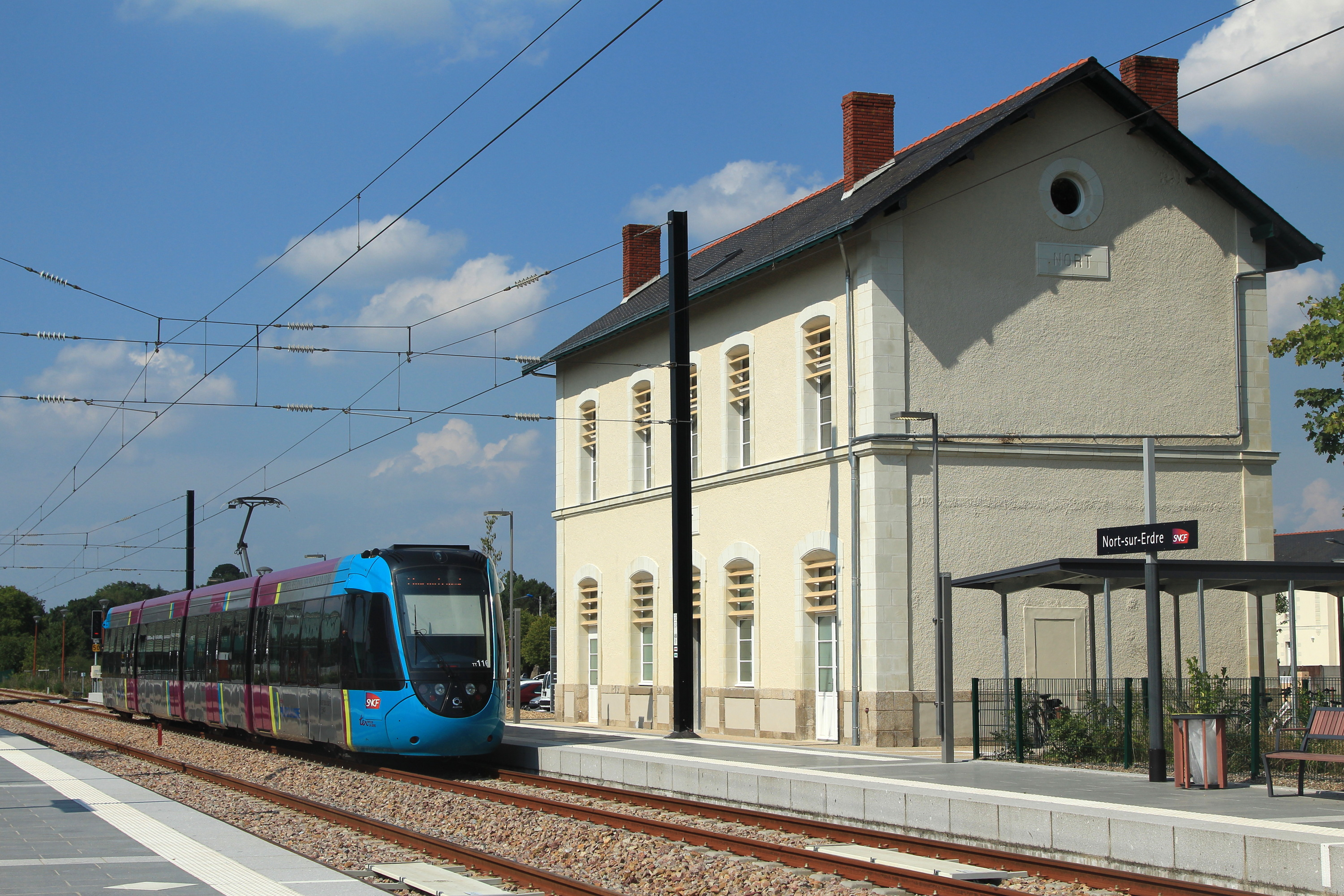 Un tram-train Nantes - Châteaubriant dessert la gare de Nort-sur-Erdre et fin de journée.